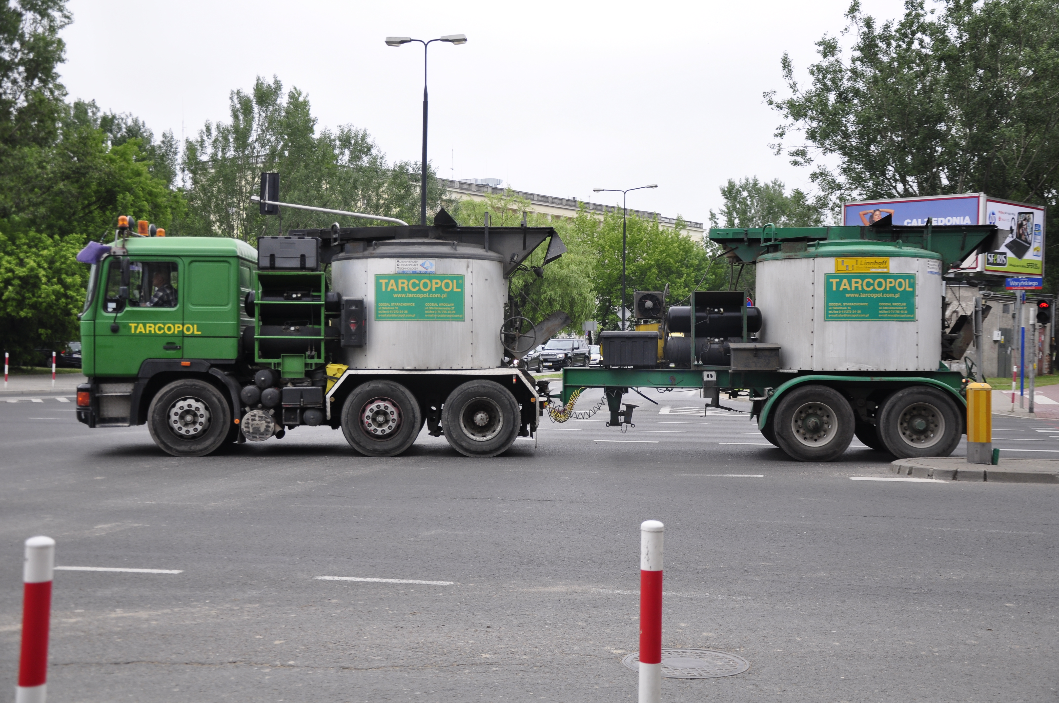 Warschau